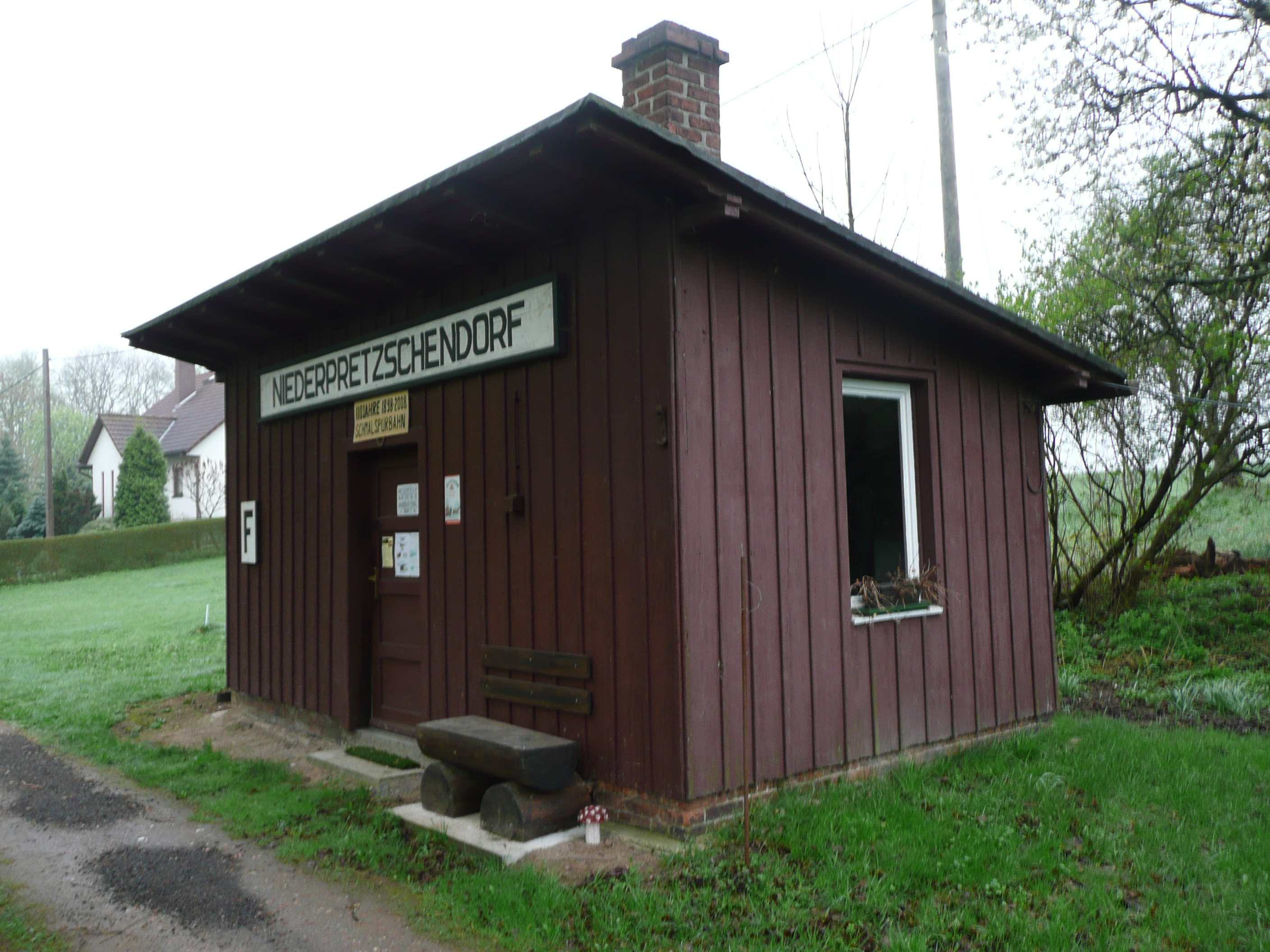 Foto der erhaltenen Wartehalle Niederpretzschendorf